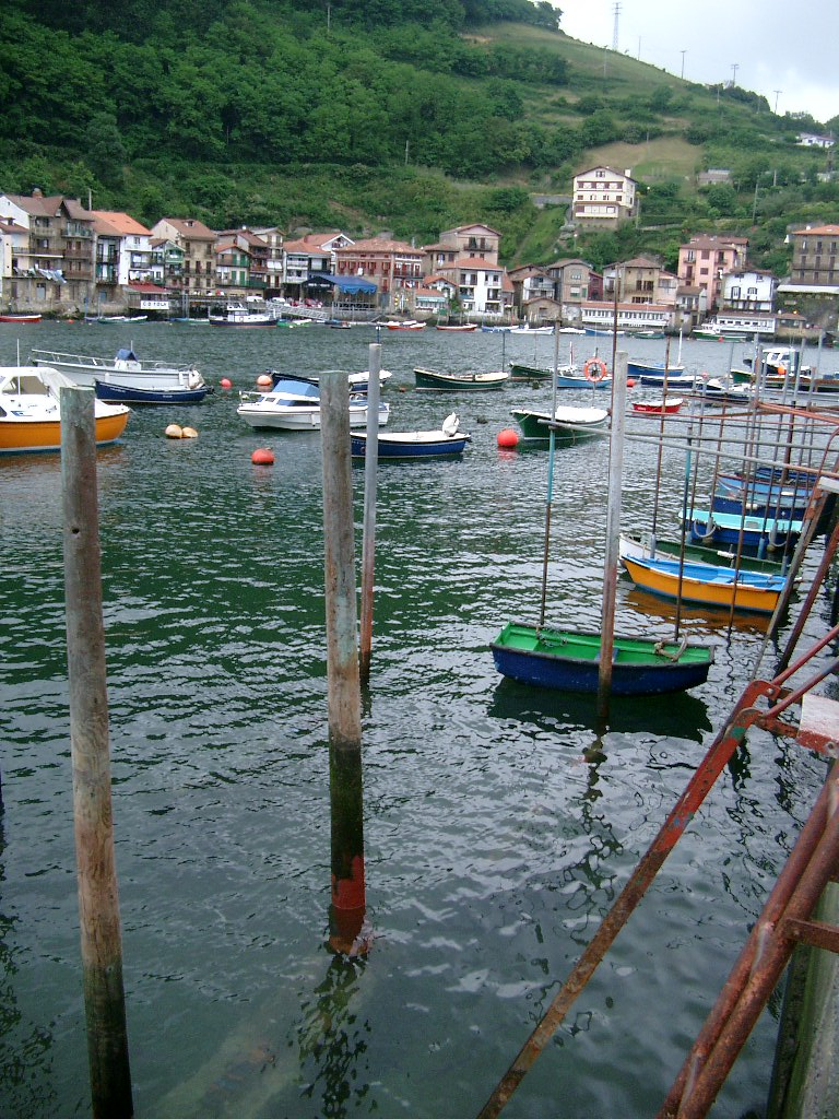 Pasai Donibane, Gipuzkoa